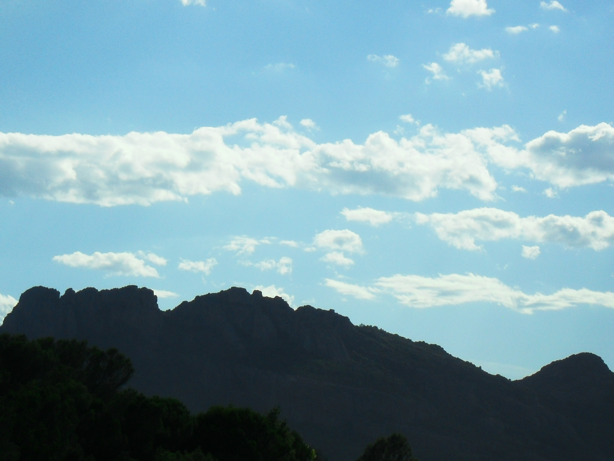 Rocher de Roquebrune-sur-Argens vu de l'autoroute (sens Nice - Aix).